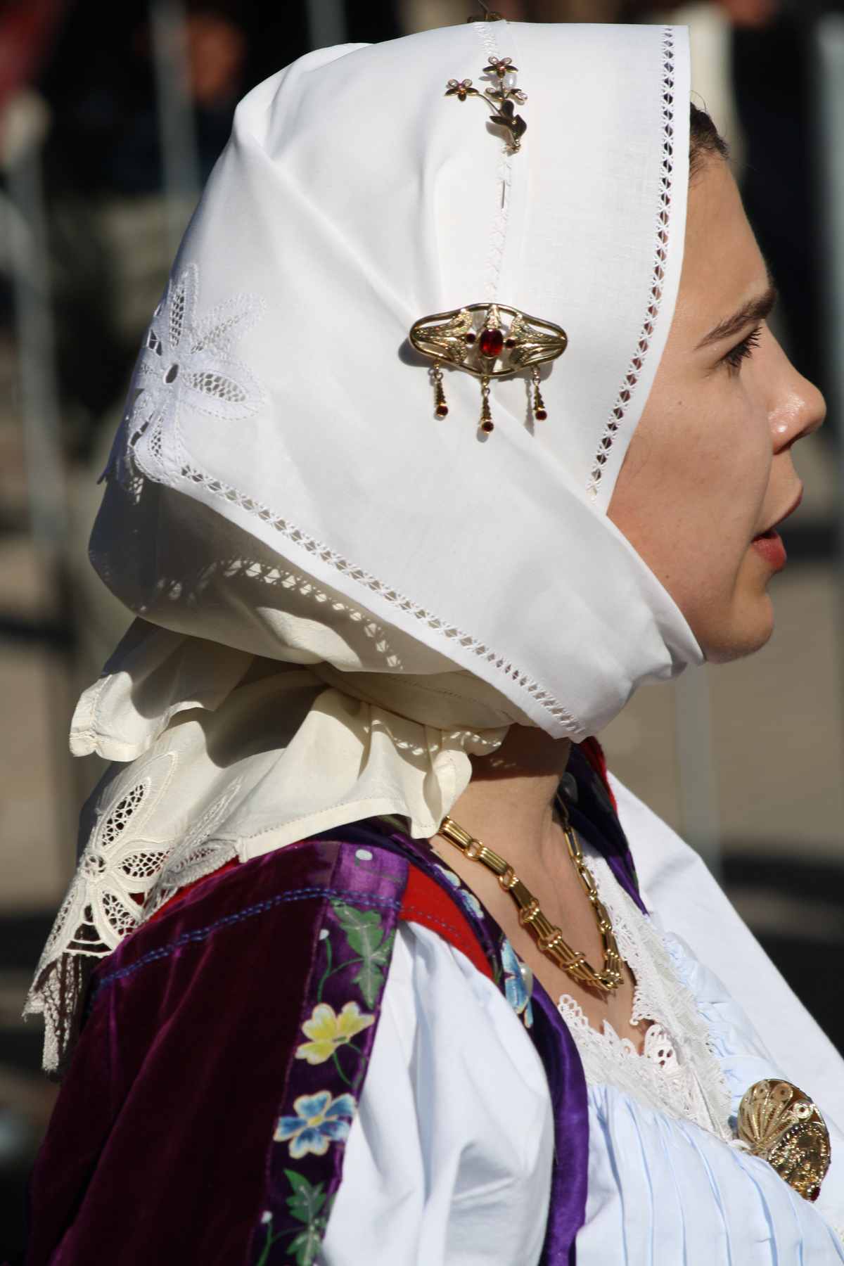 sardinian people sardinians sardi folk sardinia island sardegna sardinia sardaigne cerdeña sardinien abiti tradizionali costumi gente persone cavalcata sarda